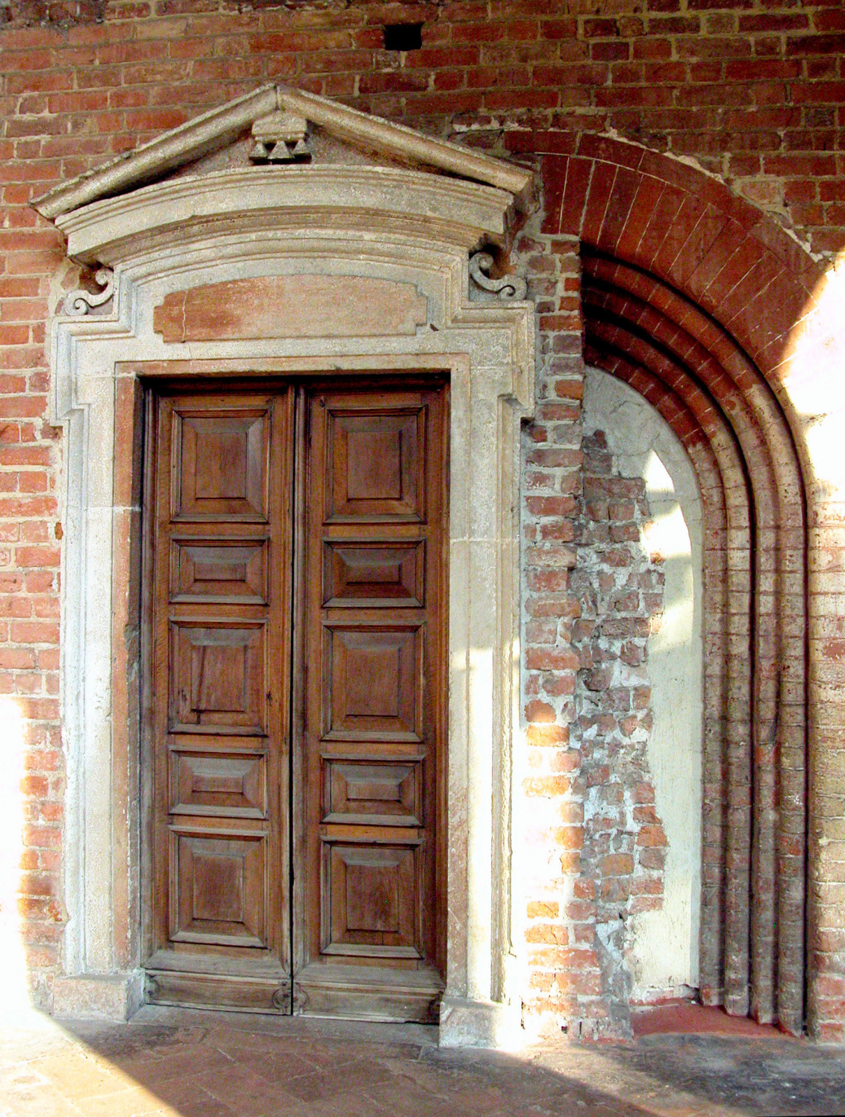 Resti del primitivo portale romanico emergono al di sotto del rifacimento di epoca manierista sulla facciata dell'Abbazia di Chiaravalle a Milano.